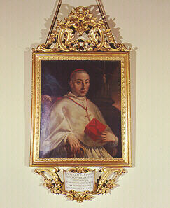 Portrait of Melchiorre Benedetto Lucidoro Gioannetti